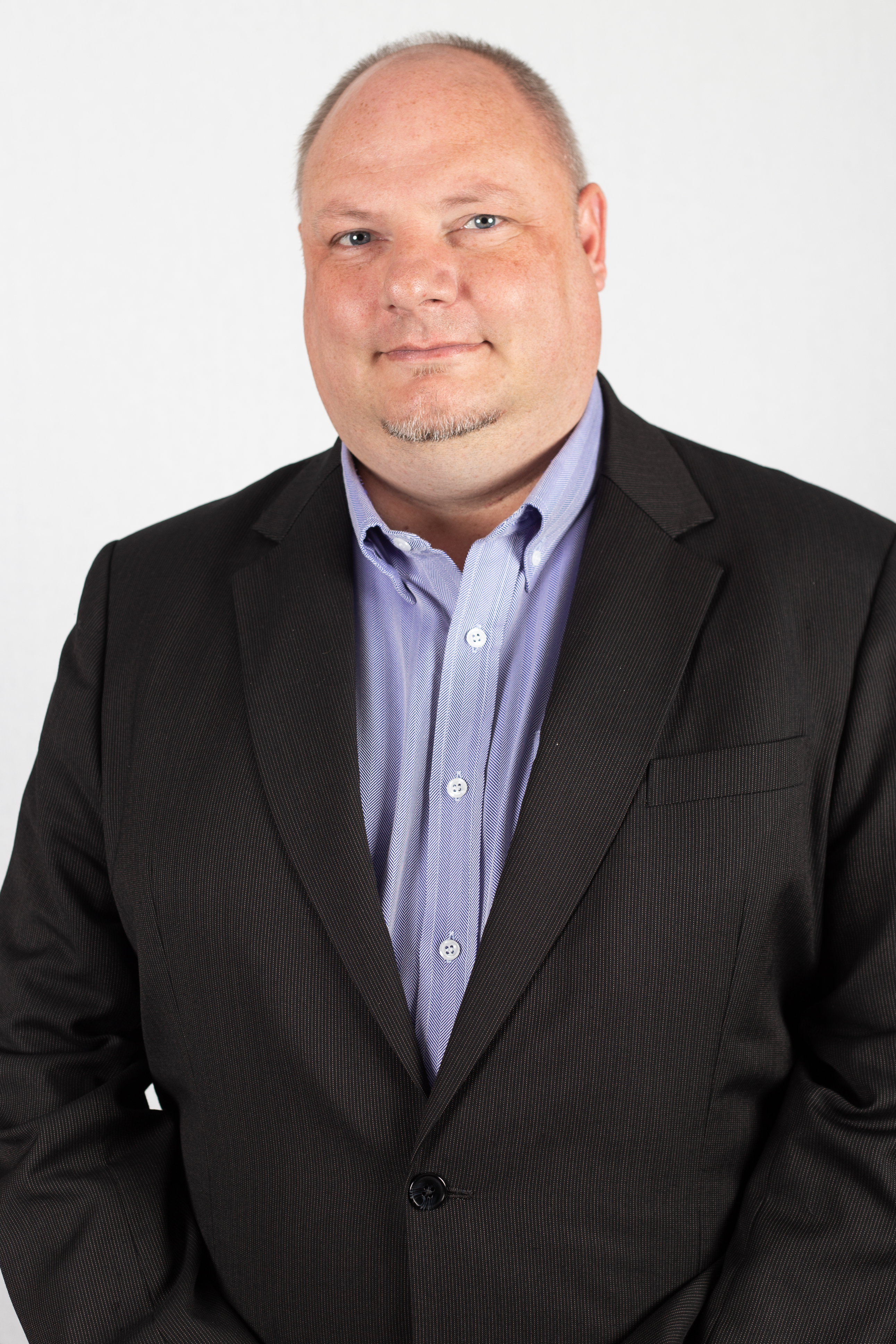 Hendrik Lange, MdL Sachsen-Anhalt, Die Linke